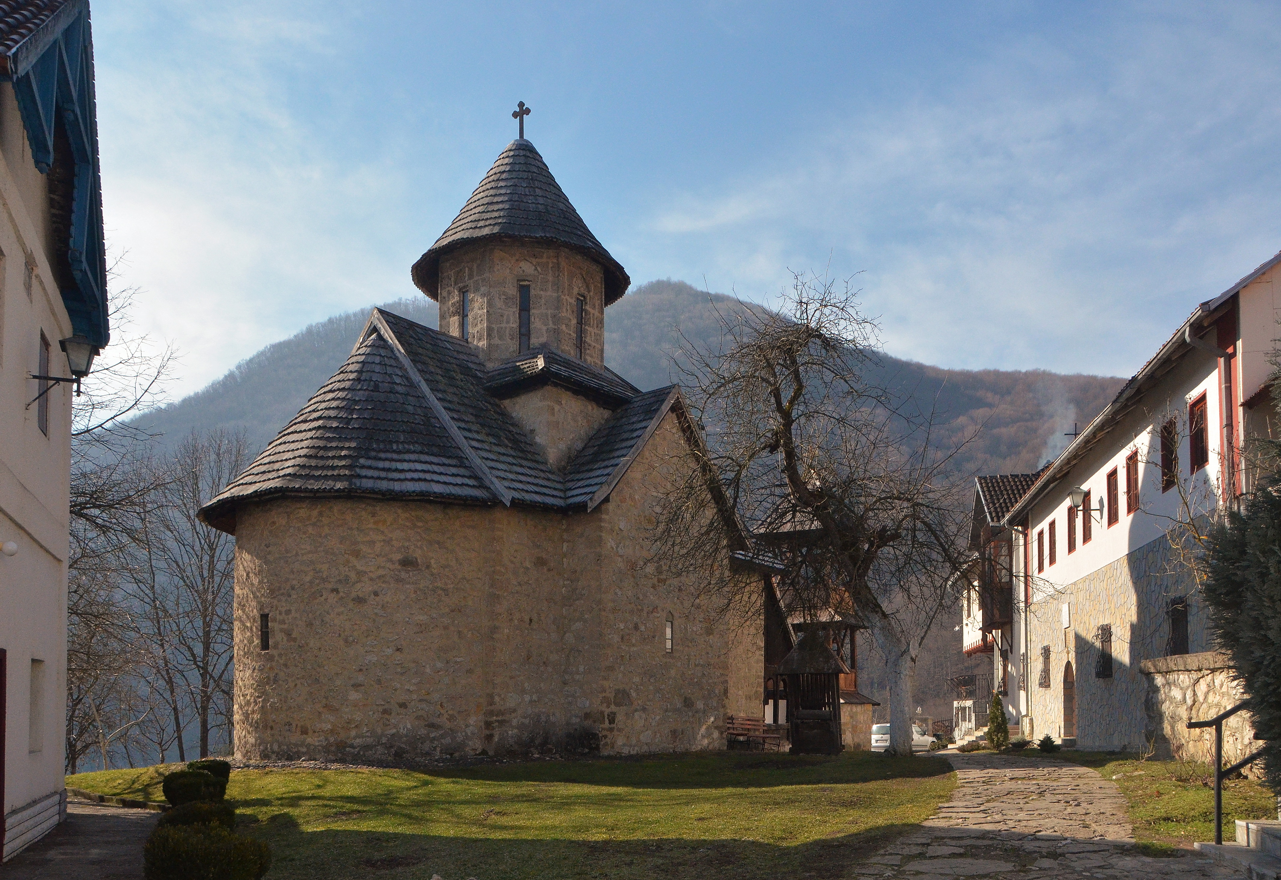 У манастирском кругу, сем цркве, постоји неколико зграда и конака подигнутих у разним временима.